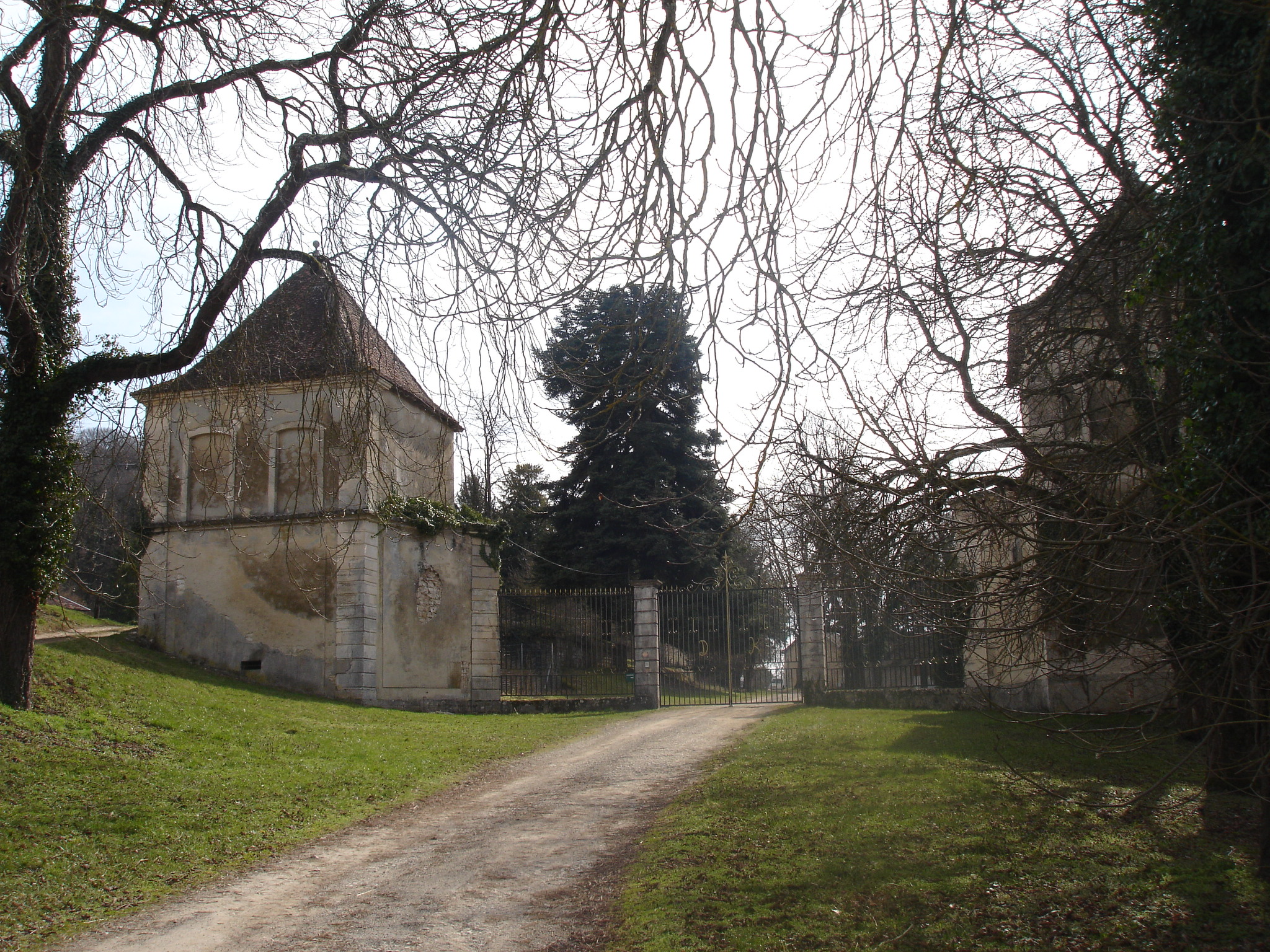 Dizimieu (38) : L'entrée du château